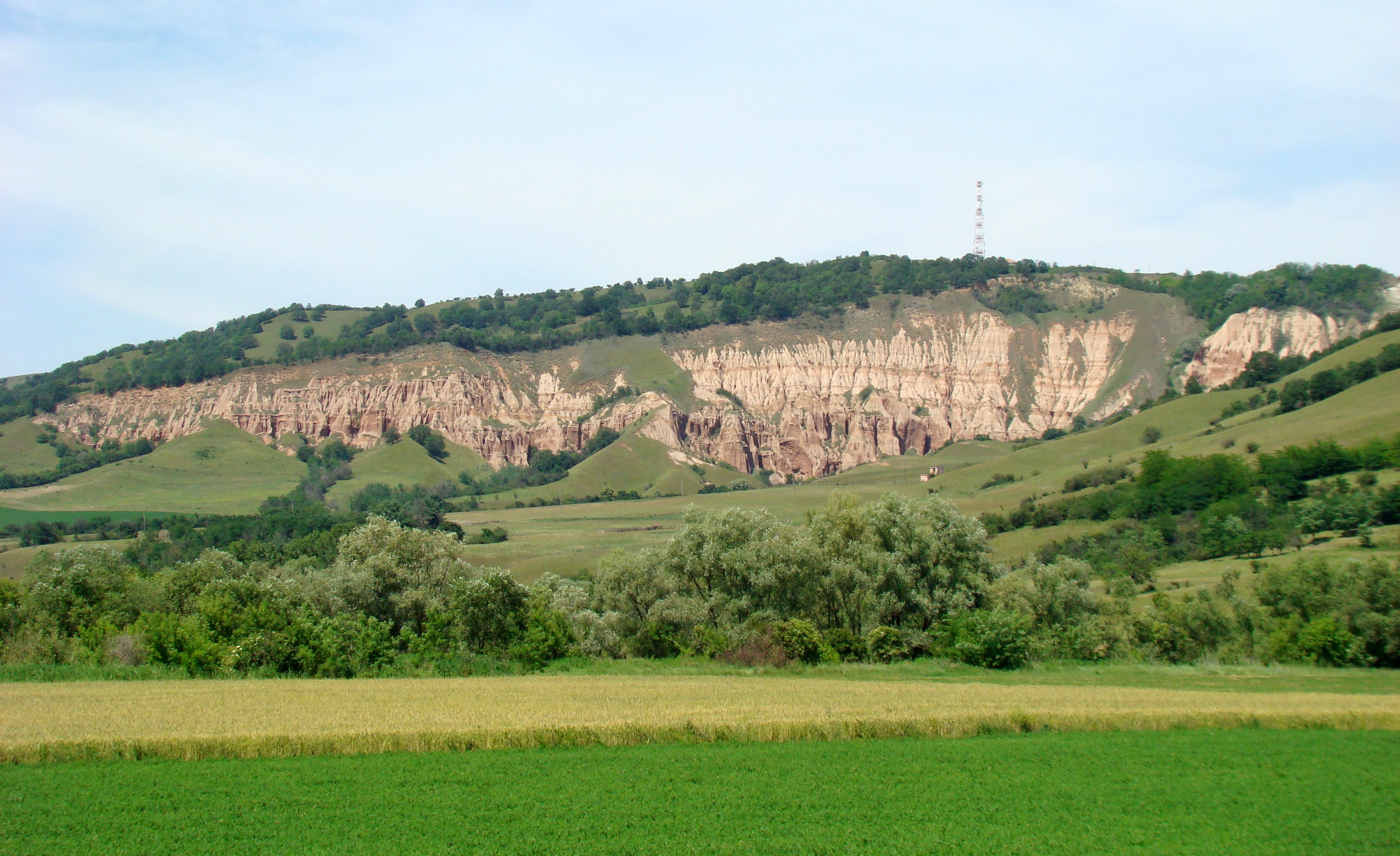 Râpa Roșie, rezervație geologică și floristică, județul Alba